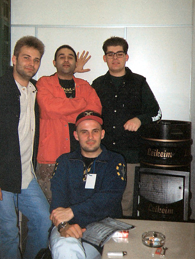 Gruppenbild im Backstagebereich des Sunset-Clubs mit Maximilian "Westbam" Lenz, Markus "Roy" Ströbel und Armin Mastoffi von der Frontpage-Motogussi-Tour (Timing Booking)